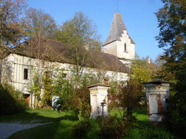 Schloss Inharting_Schlosskomplex1